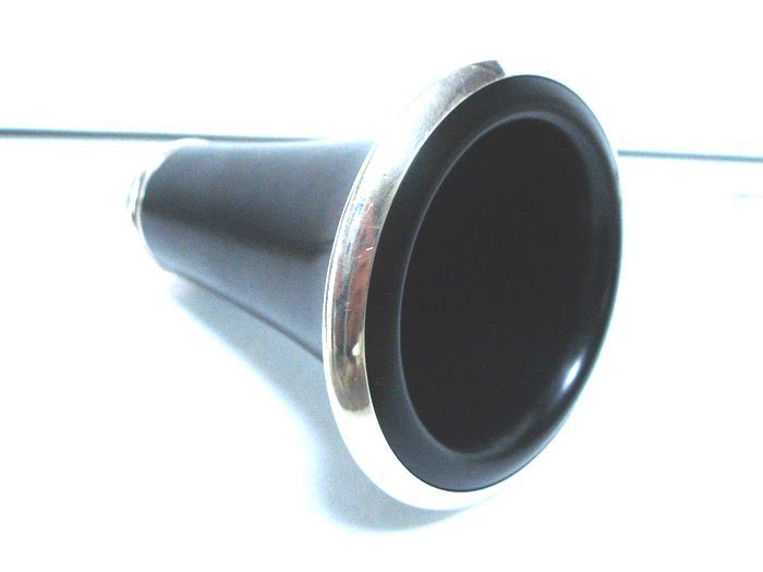 ClarinetBell